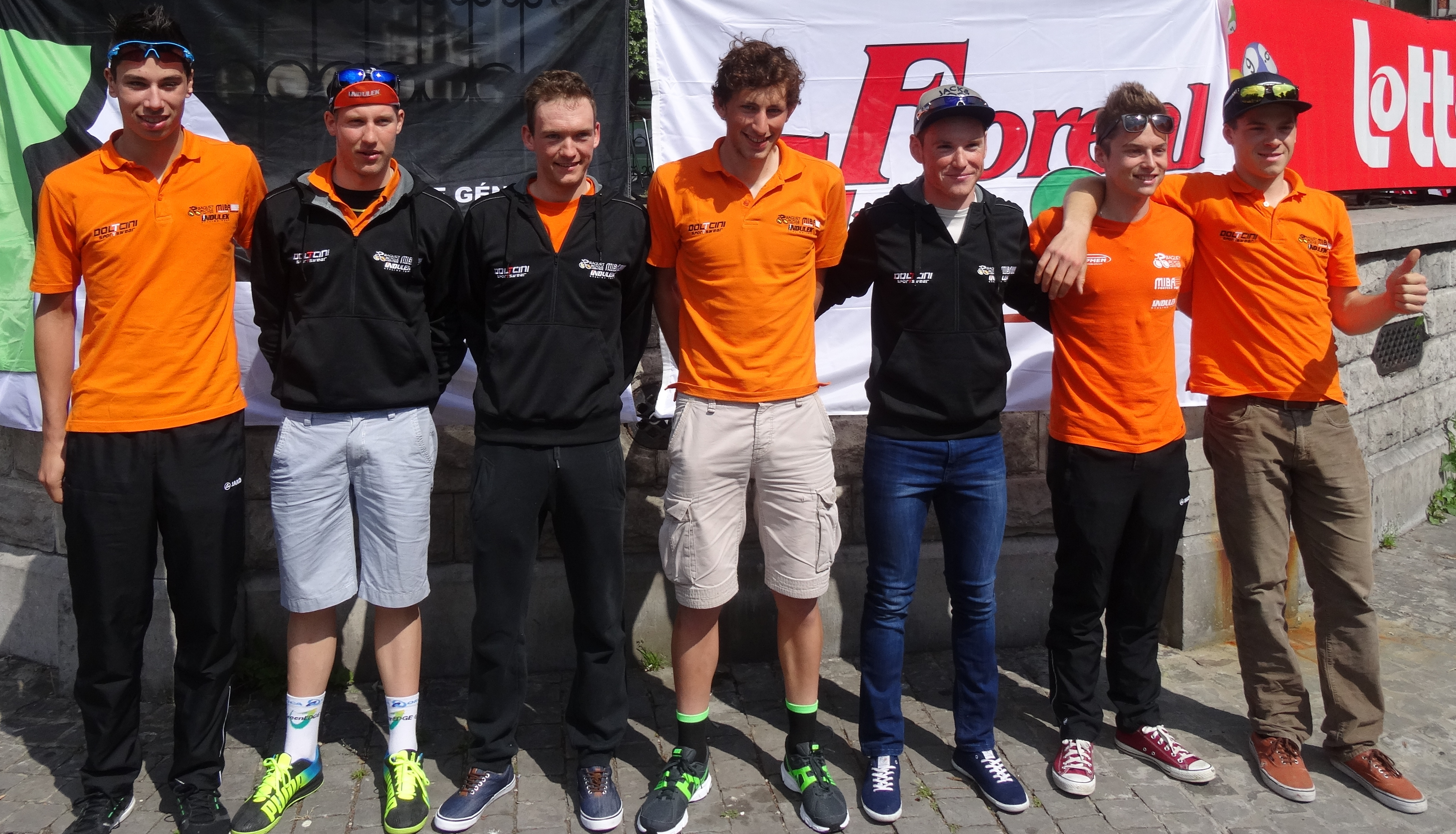 Reportage réalisé le samedi 17 mai à l'occasion du départ du Grand Prix Criquielion 2014 à Boussu, Belgique.